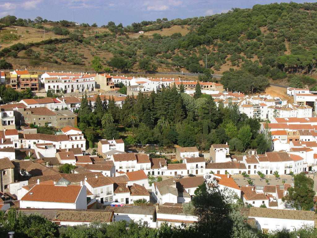 Vista panorámica - Aracena - Huelva - España